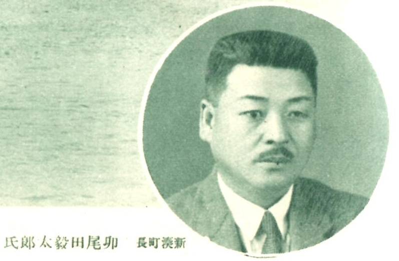 卯尾田毅太郎